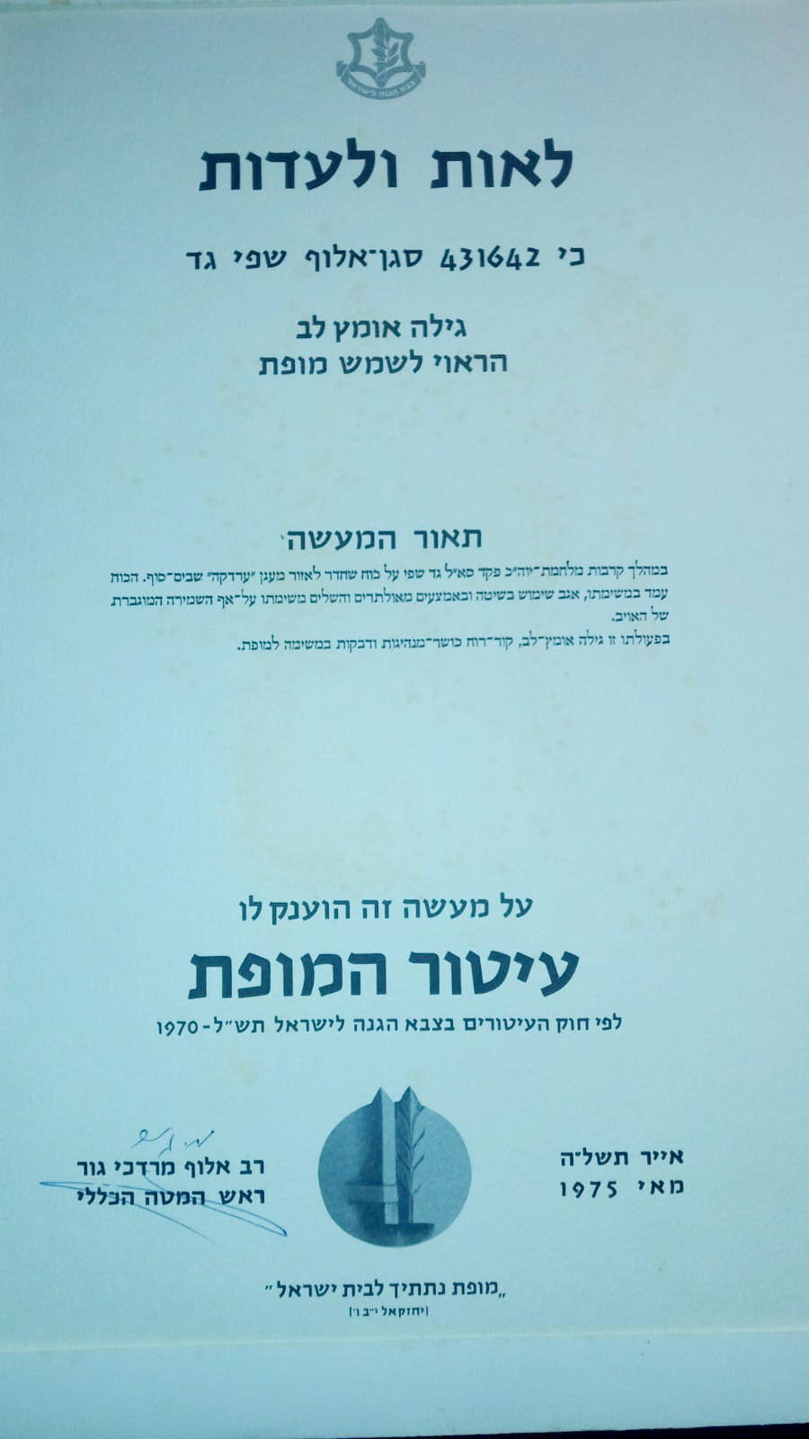 תעודת עיטור המופת לגדי שפי על הטבעת ספינת טילים בע'רדקה 1975